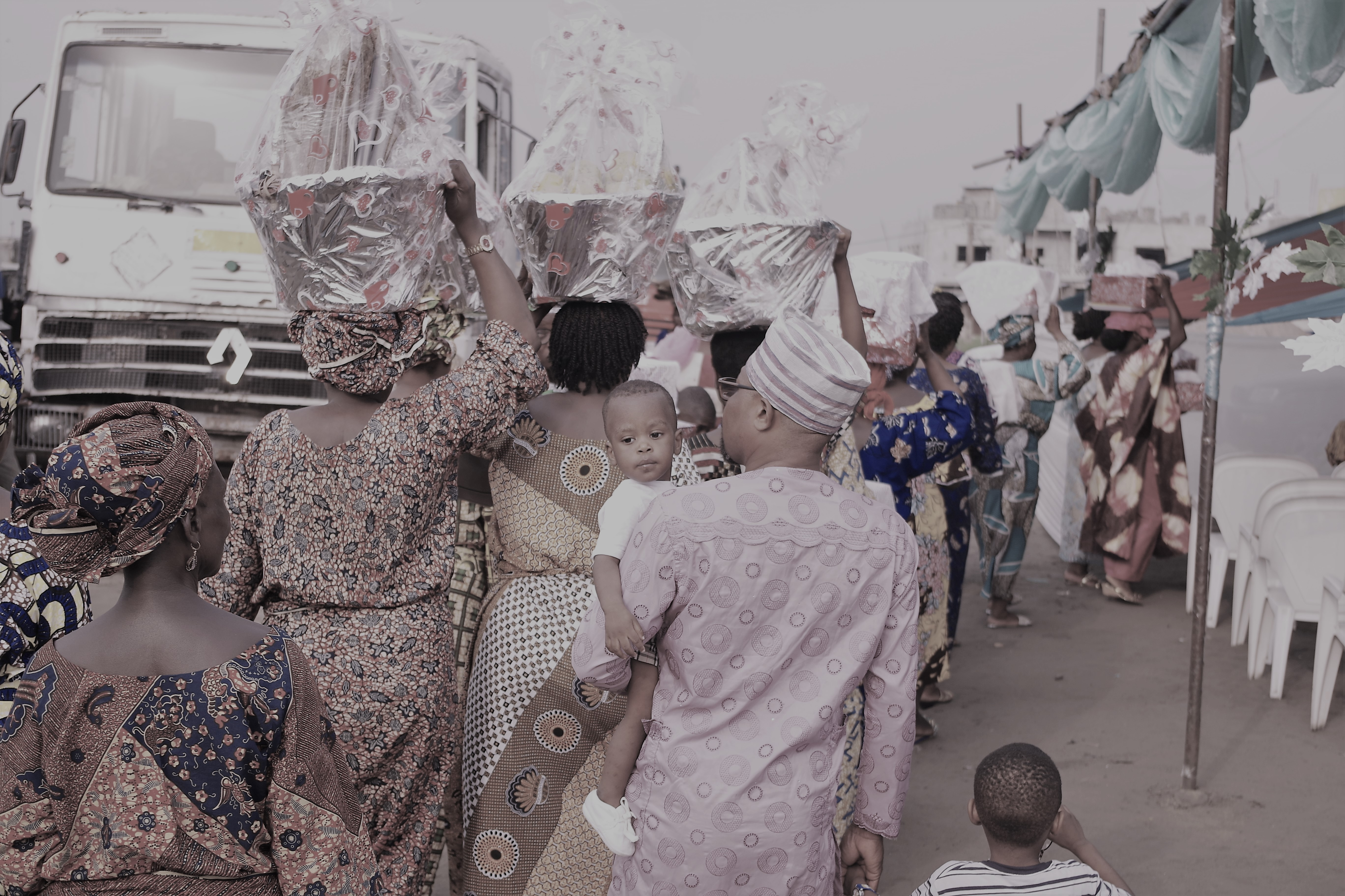 En route pour la remise des cadeaux au parents de la future mariée pour la dot (mariage traditionnel) au Bénin